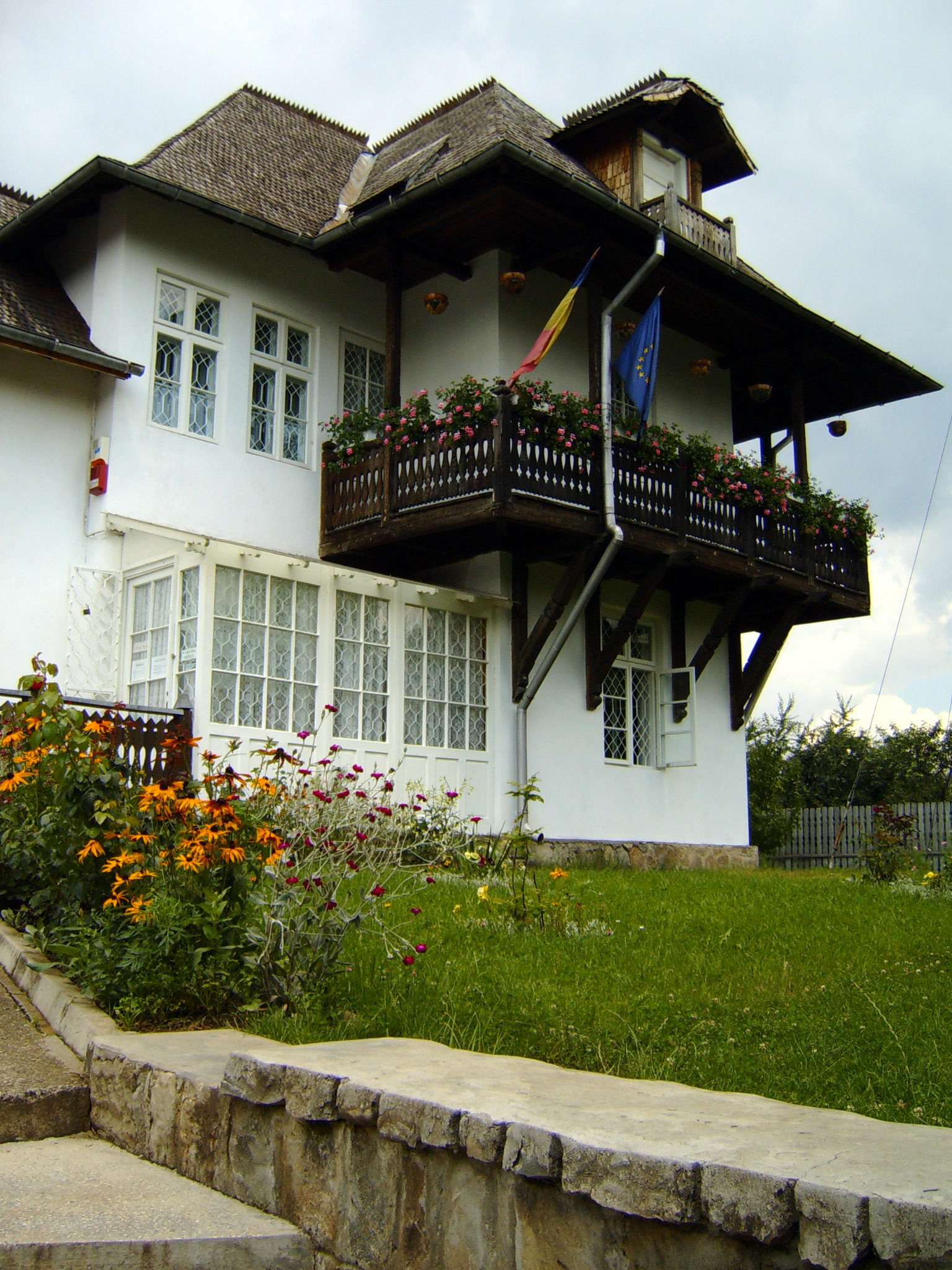 Muzeul N. Grigorescu din Campina